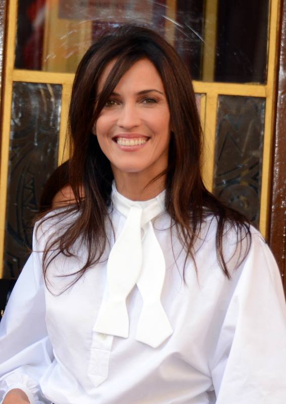 Linda Hardy à la cérémonie des Molières